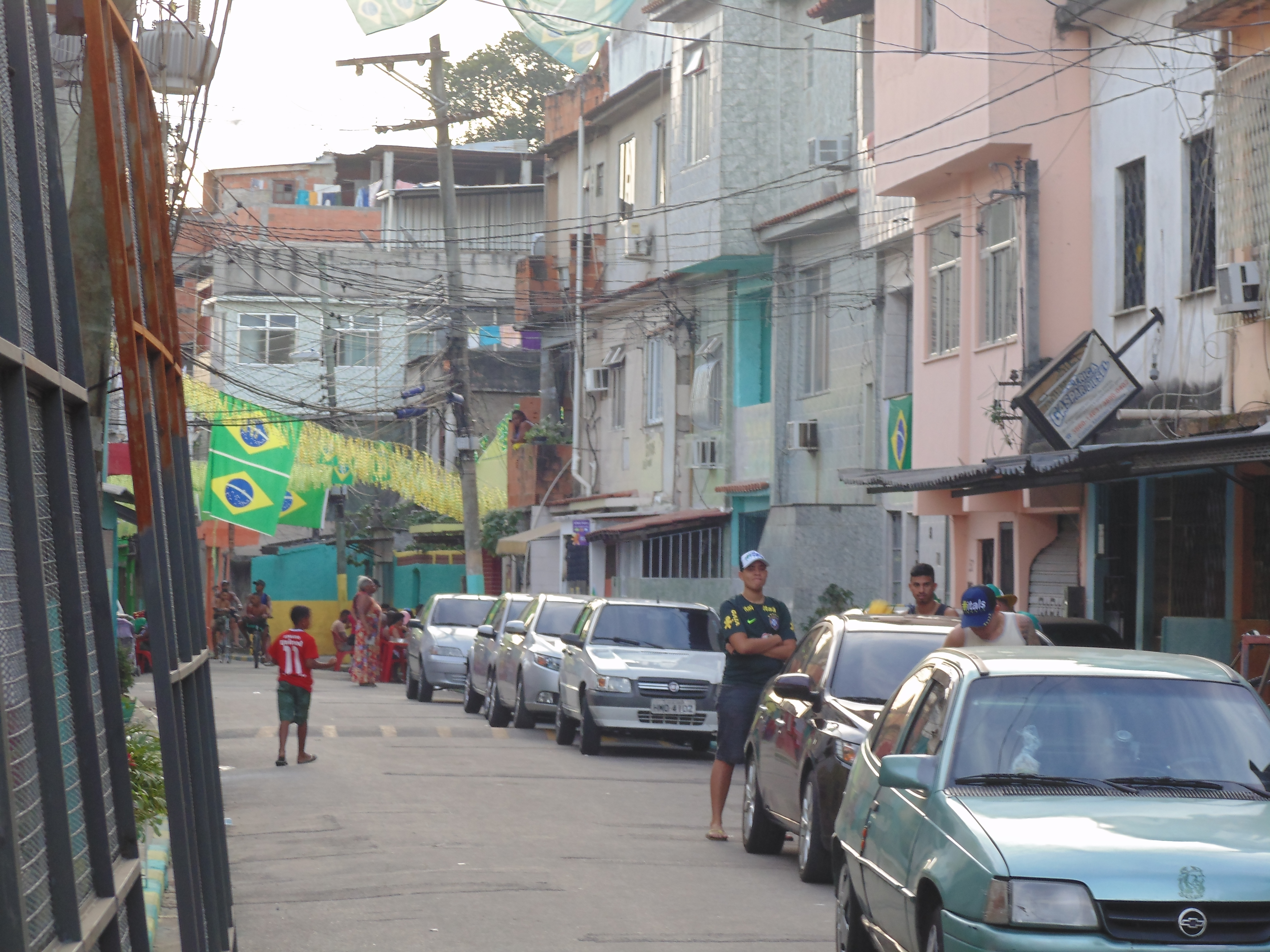 Detalhe da favela do Parque Arará, em Benfica, no Rio de Janeiro.